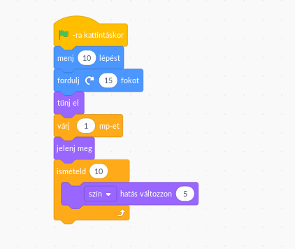 Scratch parancsszavak. Egy rövid utasítássorozat